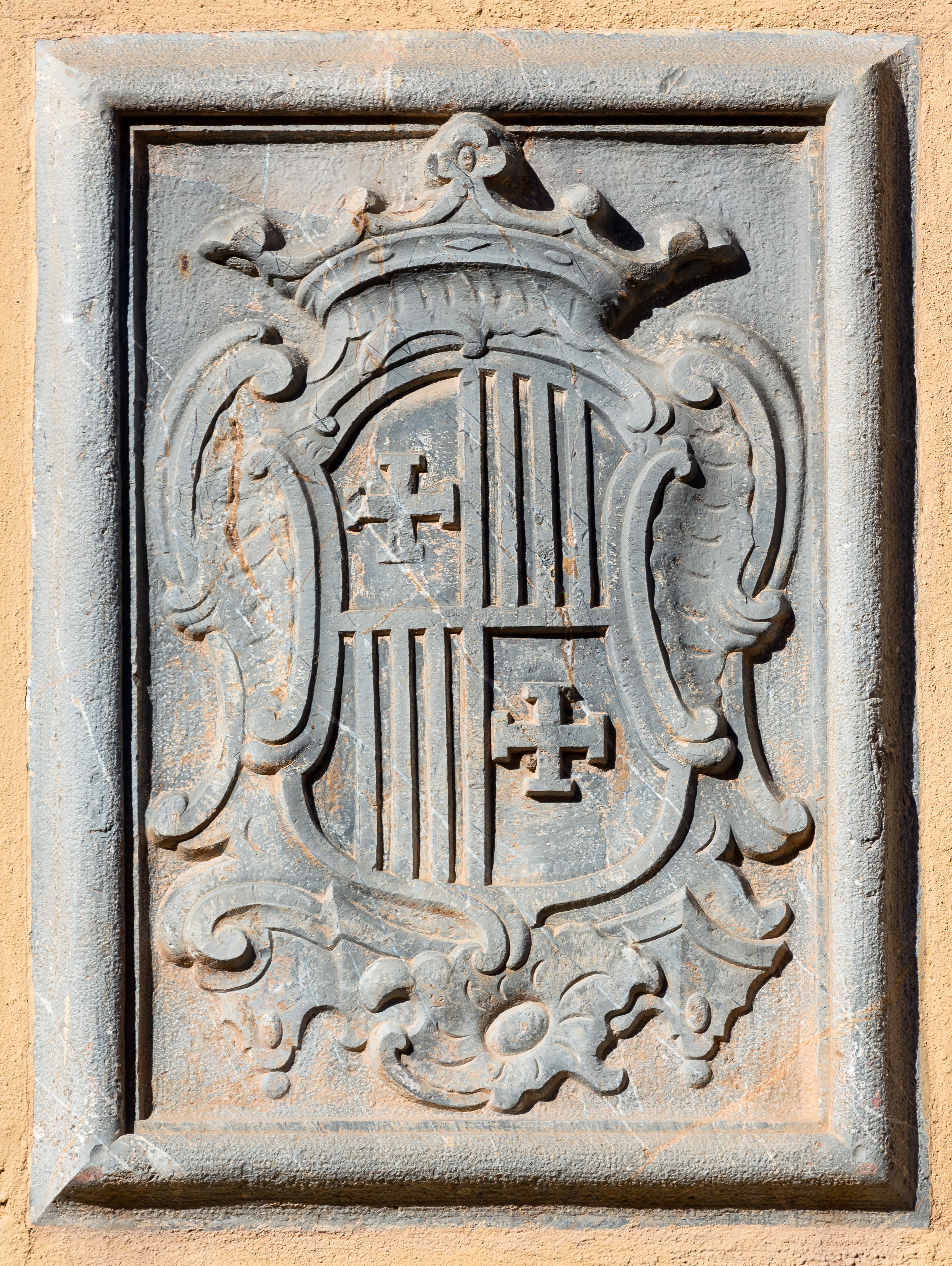 Escudo de Fernando de Aragón, Duque de Calabria, en la Alquería de Albors de Valencia 15.250-378.